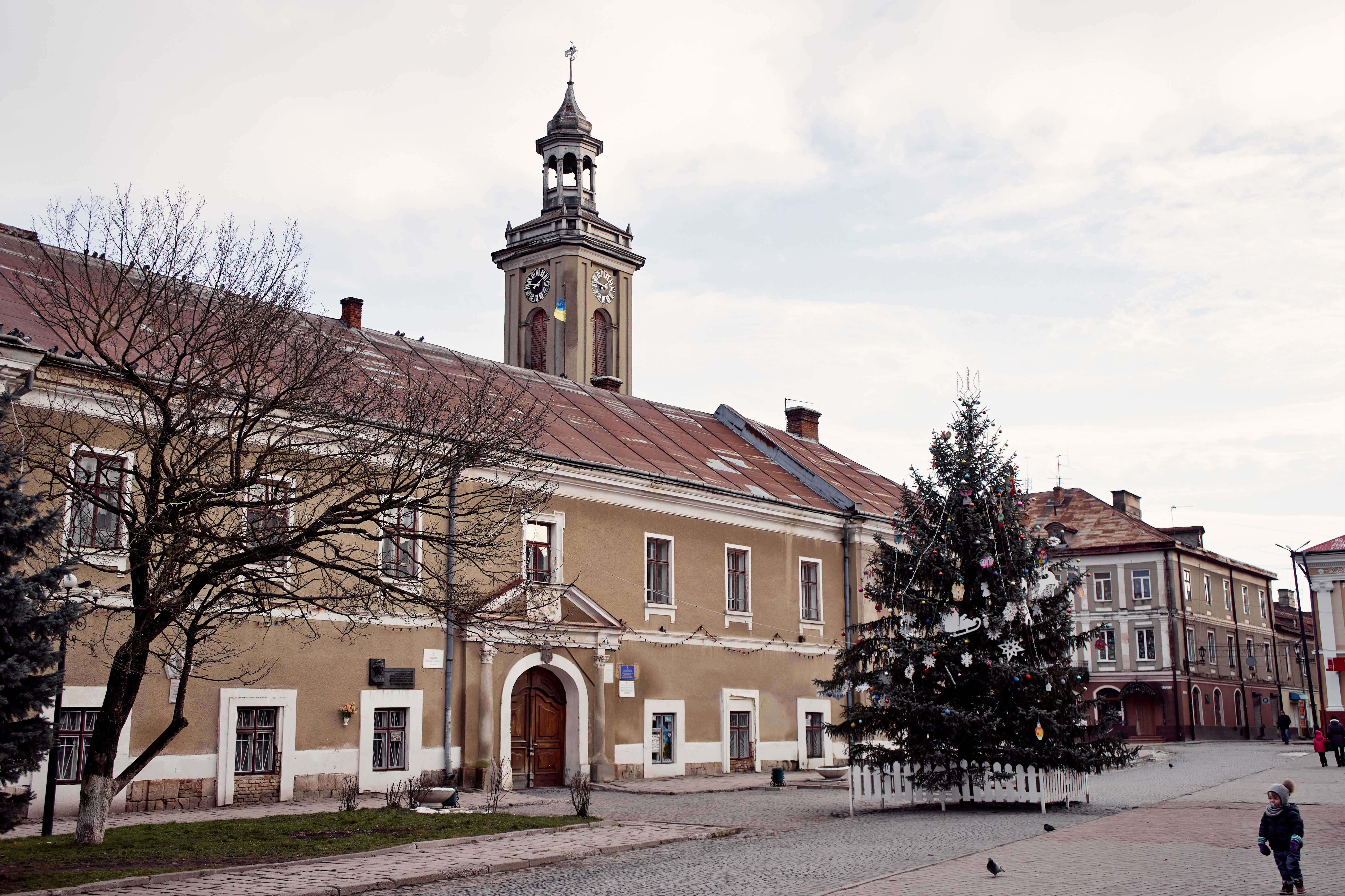 Бережанська ратуша, 2019 рік